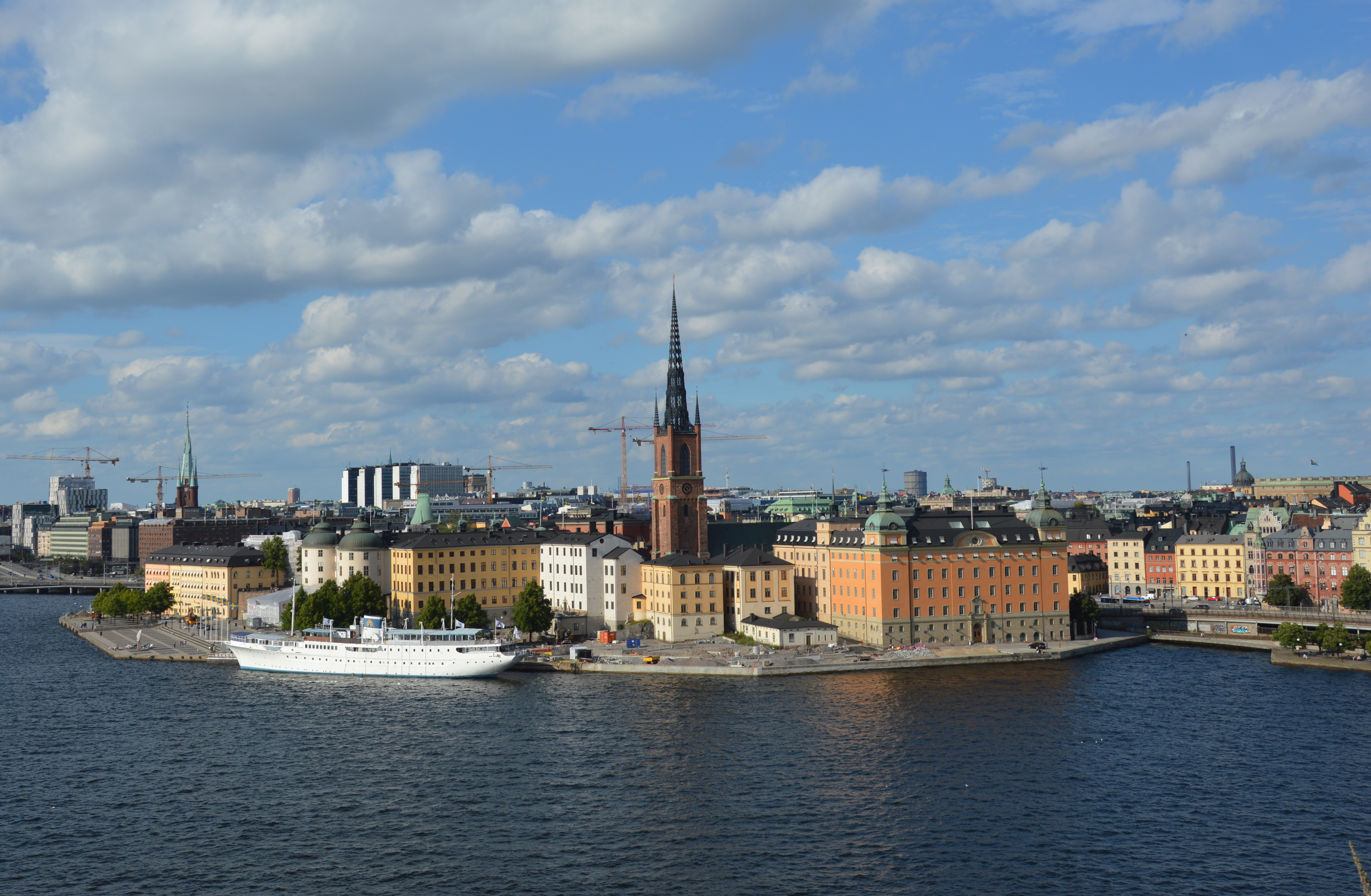 Blick auf Riddarholmen vom Monteliusvägen